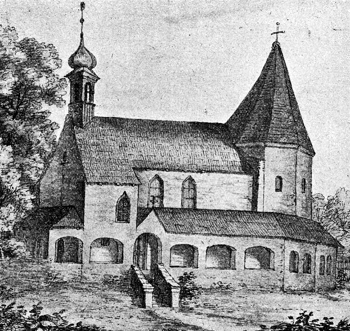 Kaple v "Kajetánce" v roce 1820 (kaple P. Marie ze Starého Oettingu v Bavořích)